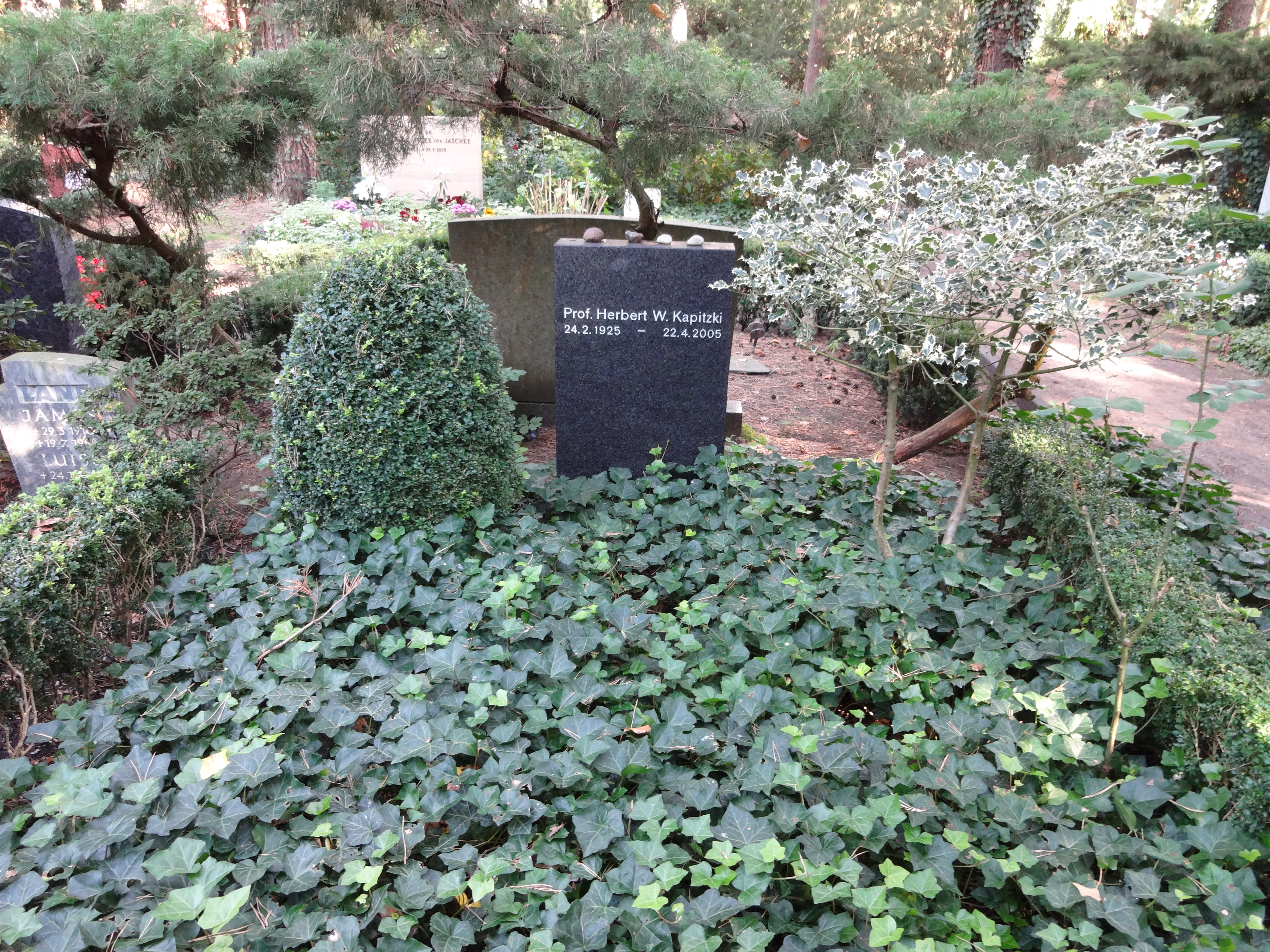 Grab von Prof. Herbert W. Kapitzki auf dem Waldfriedhof Dahlem in Berlin